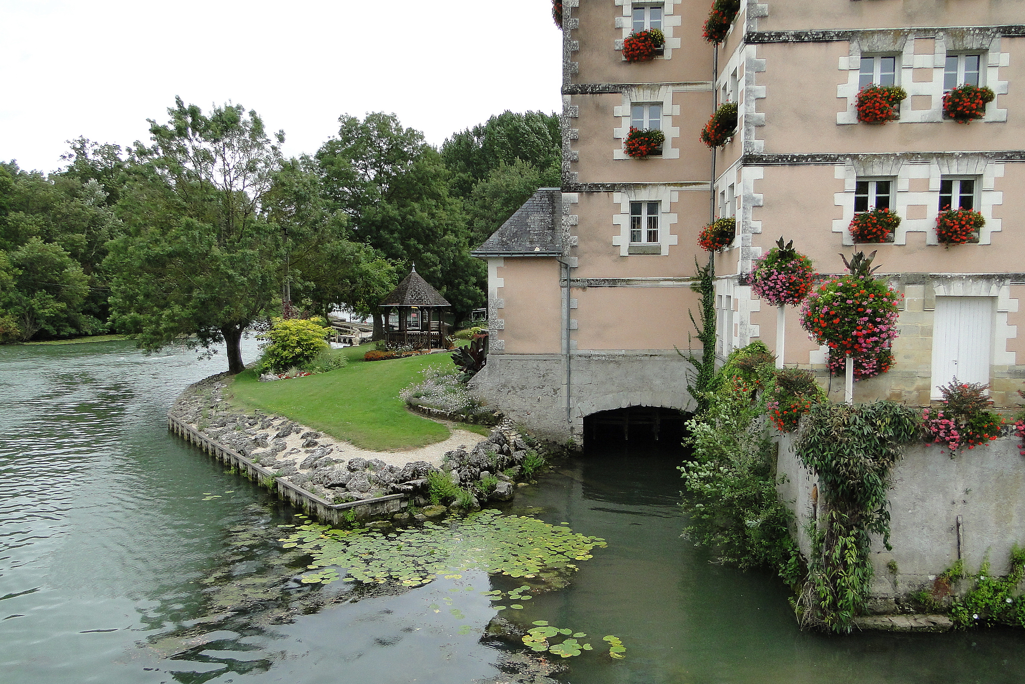 Moulin à eau de Veigné